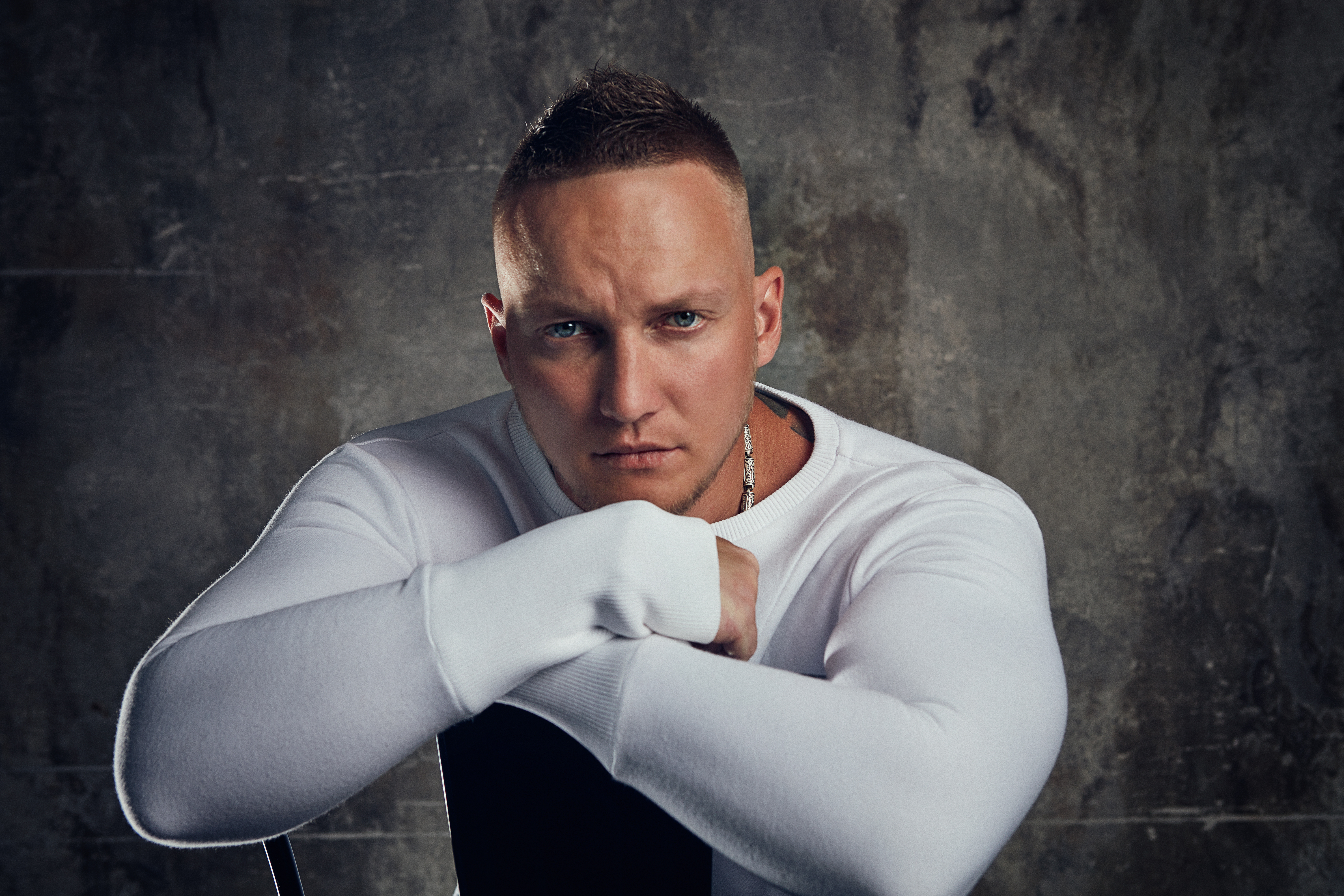 Витольд Петровский